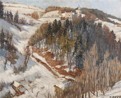 Karl Hayd Winterlandschaft mit der Ruine Wildberg